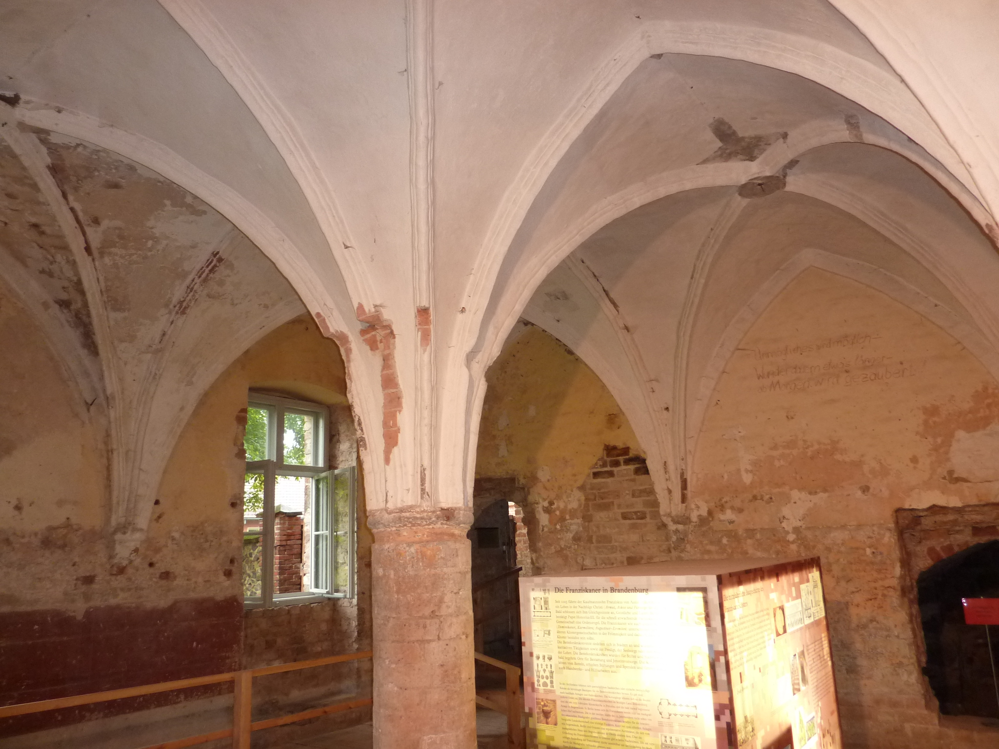 Franziskanerkloster (Gransee)